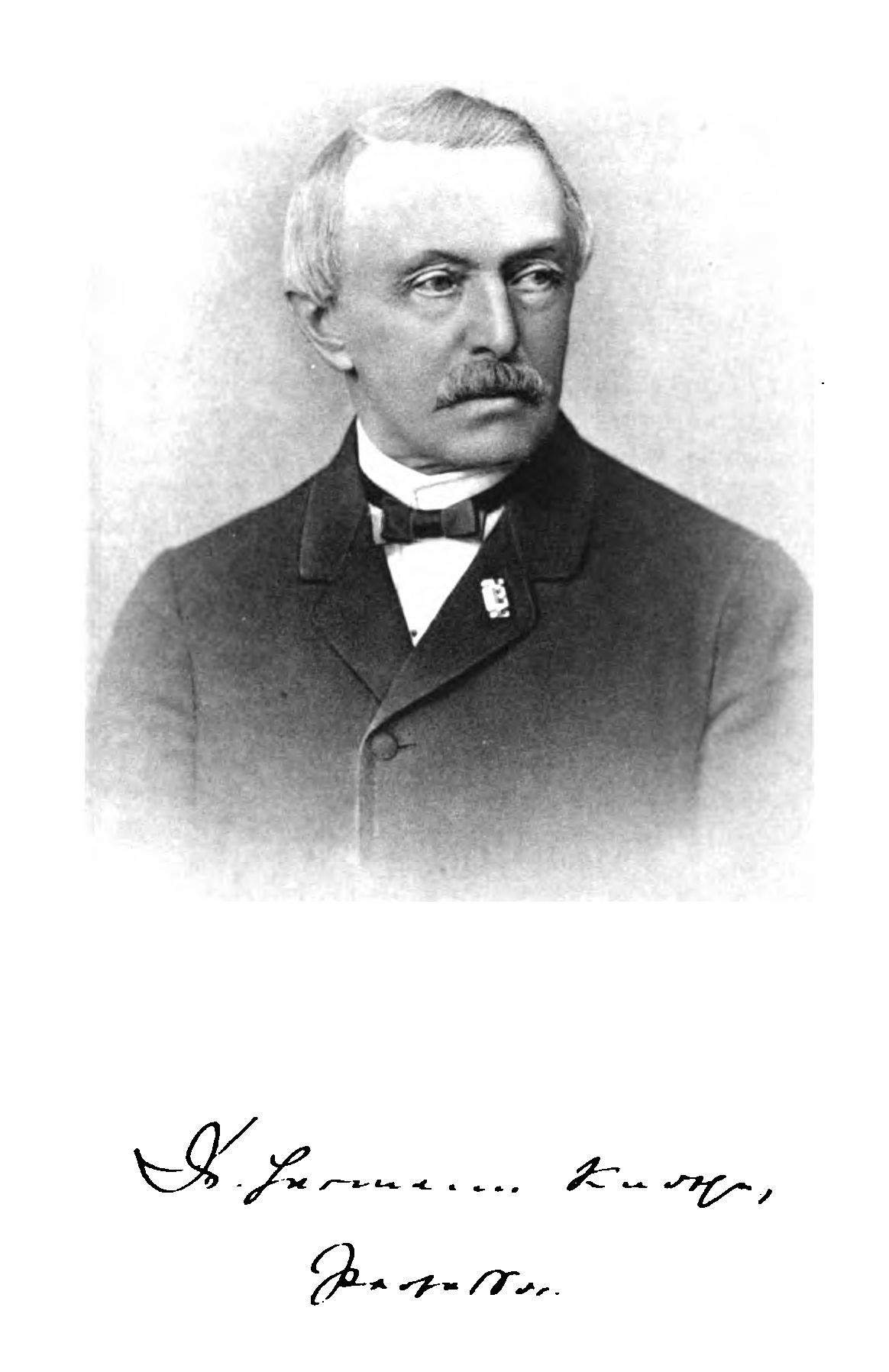 Hermann Knothe (1821-1903), in: Neues lausitzisches Magazin, Band 79.